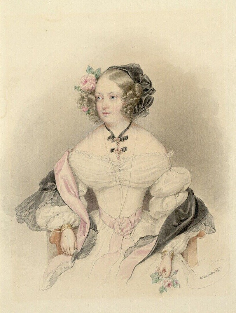 Софья Александровна Радзивилл, ур. Урусова (1804—1889)